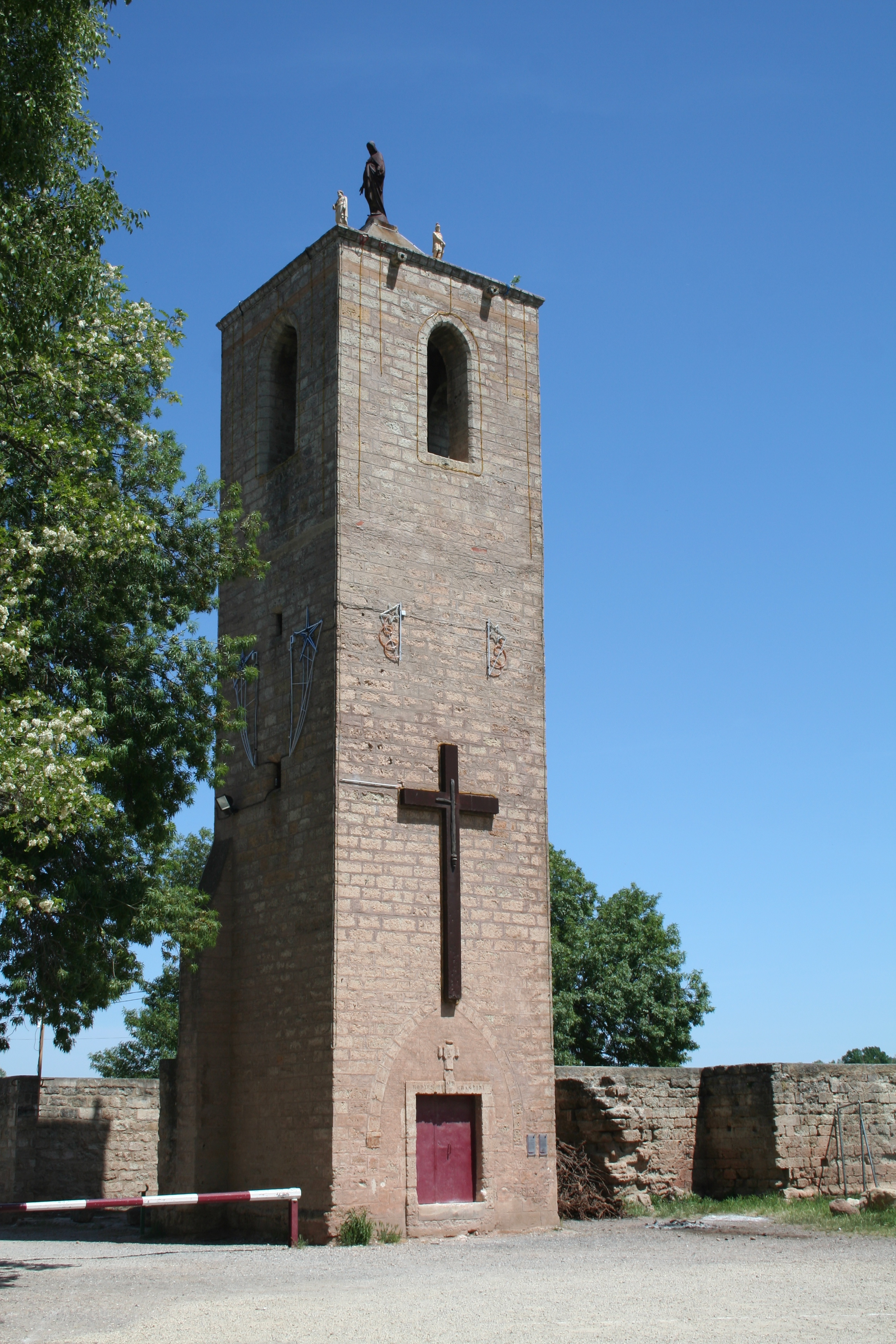 Canet (Hérault) - Clocher de l'ancienne église Saint-Martin.